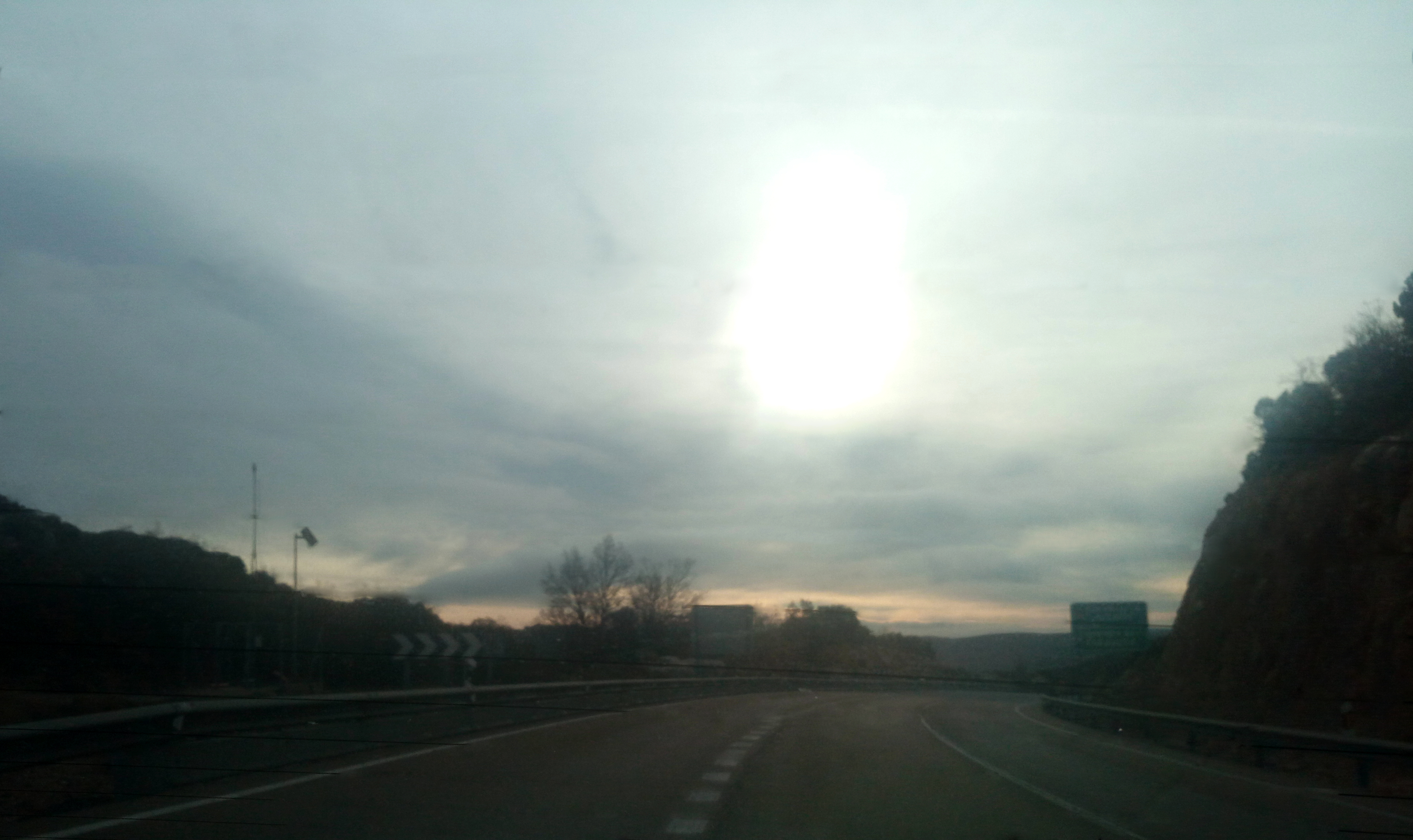 Aragonés: Muga Aragón Castiella en l'Alto de la Bigornia